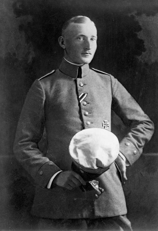 Albert Leo Schlageter AVZ 11895 Fünfzigster Geburtstag Albert Leo Schlageters Am 12. August wäre Albert Leo Schlageter, der grosse Vorkämpfer für Deutschlands Freiheit, fünfzig Jahre alte geworden. Scherl Bildarchiv 3.8.1944 [Porträt Albert Leo Schlageter in Uniform mit Eisernem Kreuz I. und II. Klasse] Abgebildete Personen: Schlageter, Albert Leo: Leutnant, Großdeutsche Arbeiterpartei, Ruhrkampf 1923 hingerichtet, Deutschland (PND 11860788X)